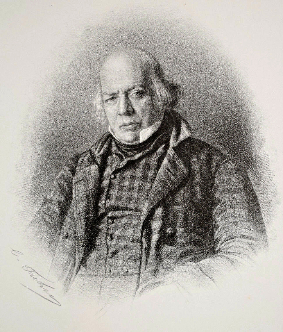 Portrait gravé du chansonnier Béranger (format 39 x 27 cm), tiré de l'ouvrage de Victor Frond, Panthéon des illustrations françaises au XIXe siècle, Paris, Abel Pilon / Lemercier, 1865 [1].